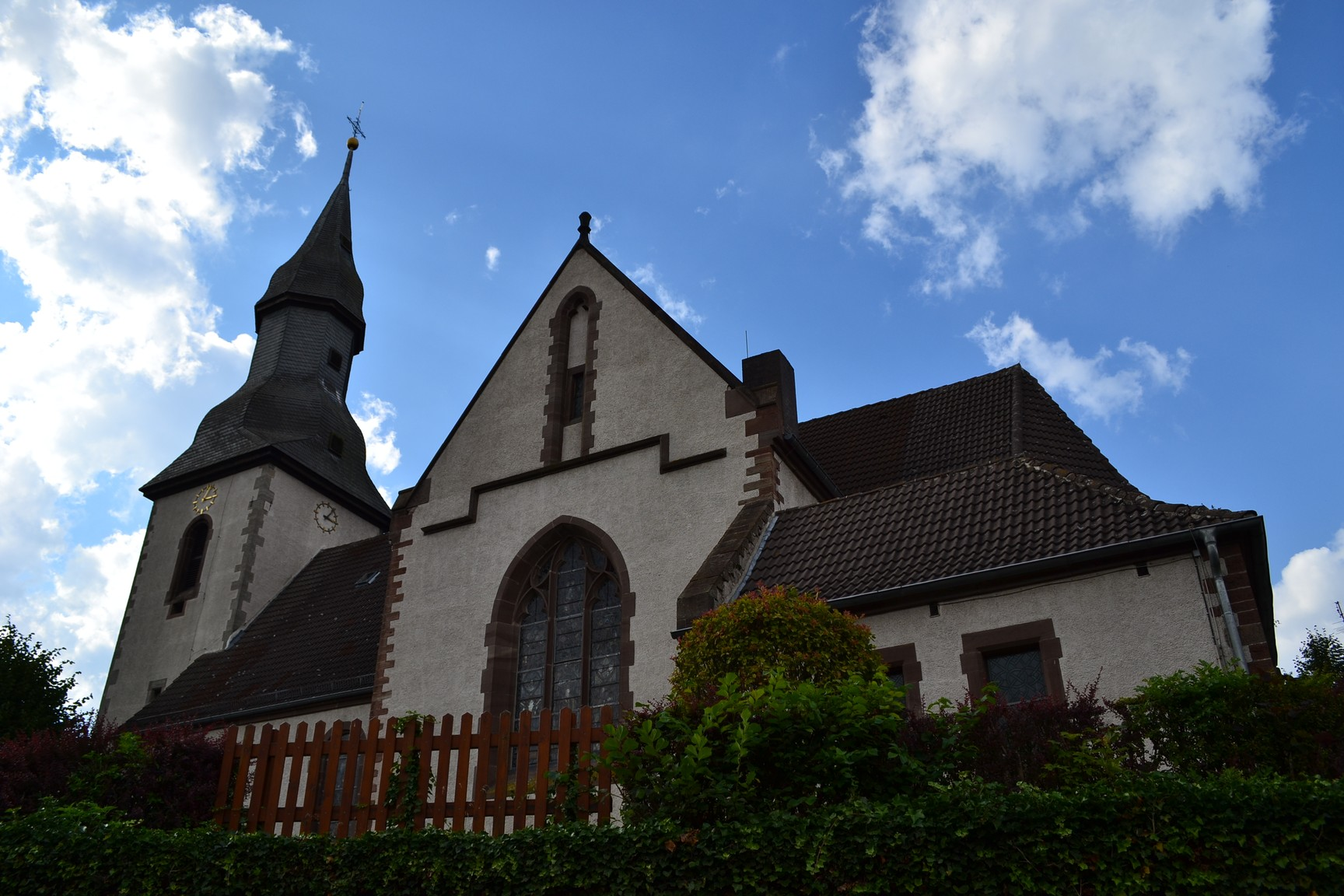 Katholische Kirche St. Kilian, Vörden (Marienmünster) This is a photograph of an architectural monument. 6